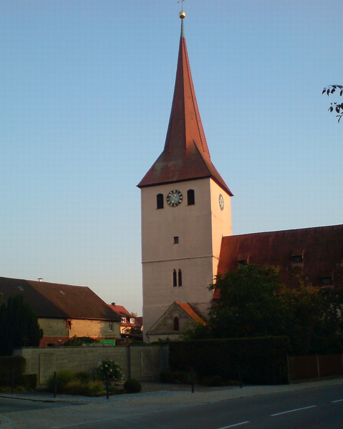 Kriegerdenkmal und ev. Kirche St. Peter und Paul in Leerstetten, Blick von Norden